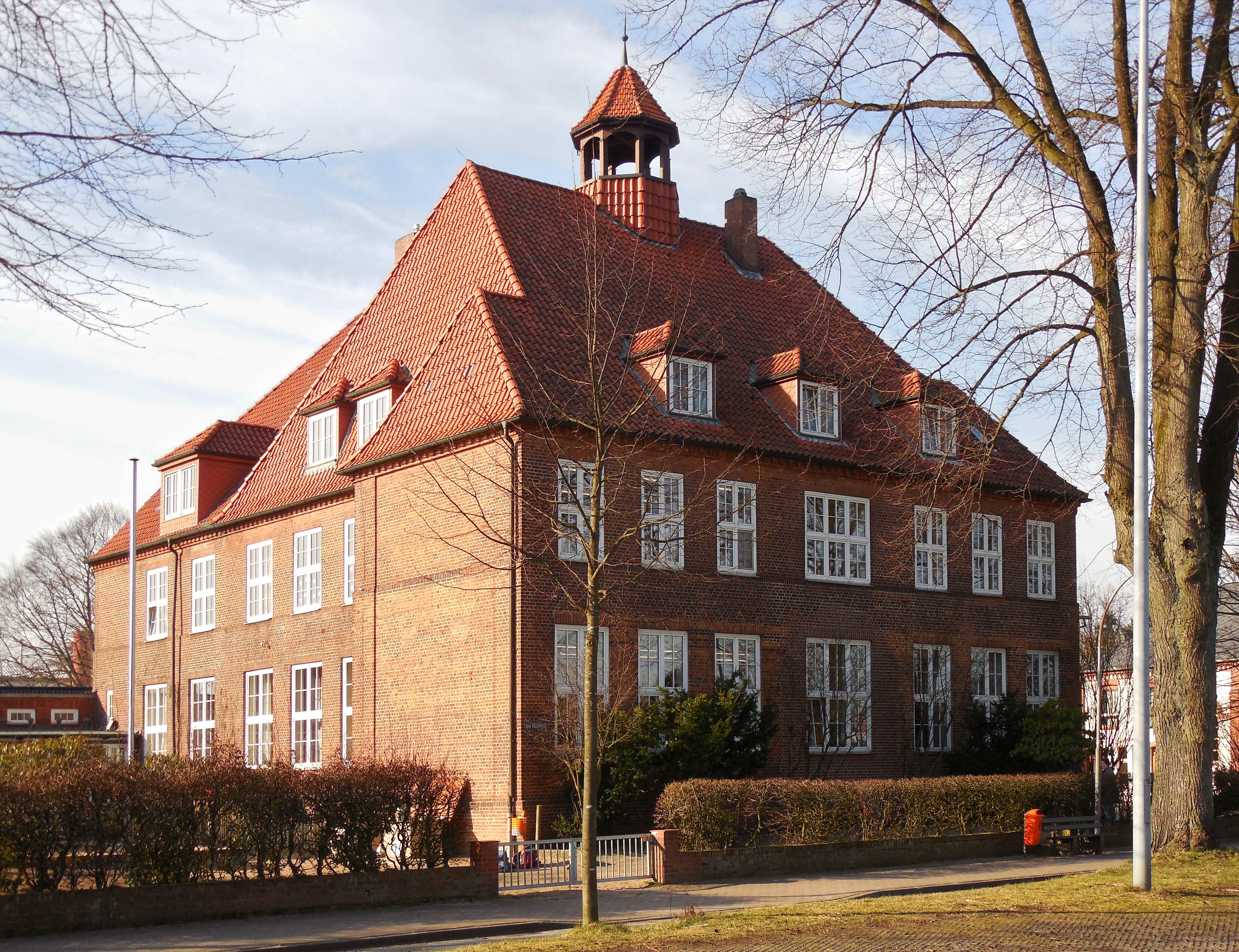 Grundschule